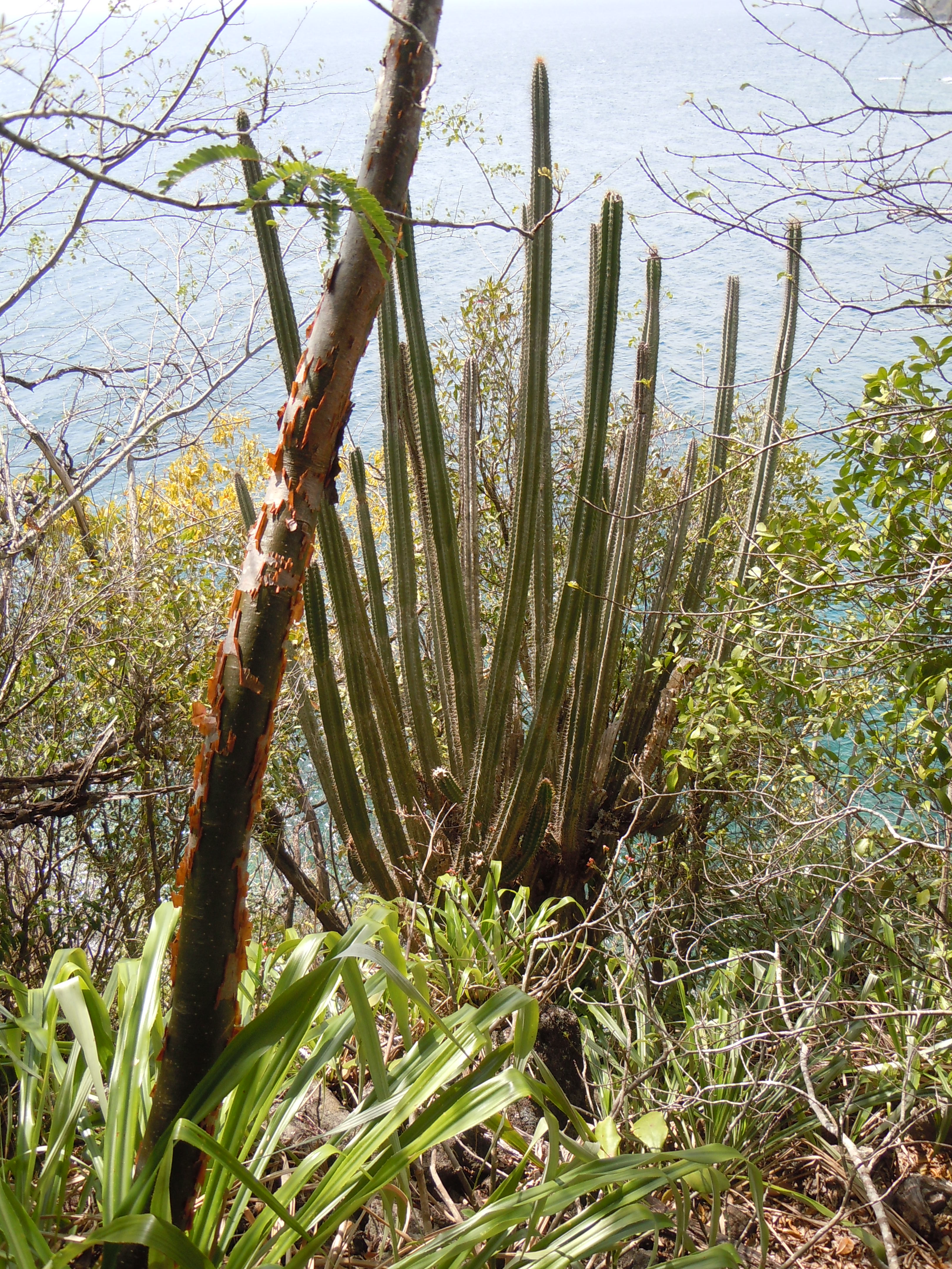 Pilosocereus royenii - Malendure - Bouillante - Guadeloupe